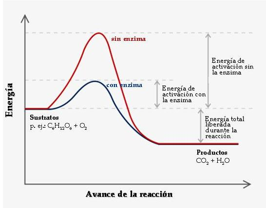 Evolución energética de un proceso de catálisis enzimática